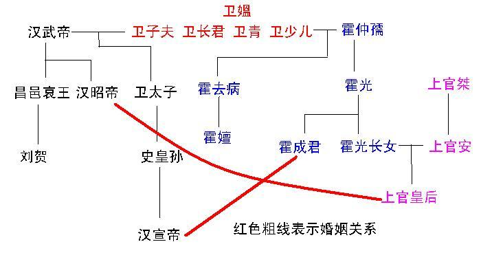 卫霍集团核心人物及汉朝皇室之间关系示意图